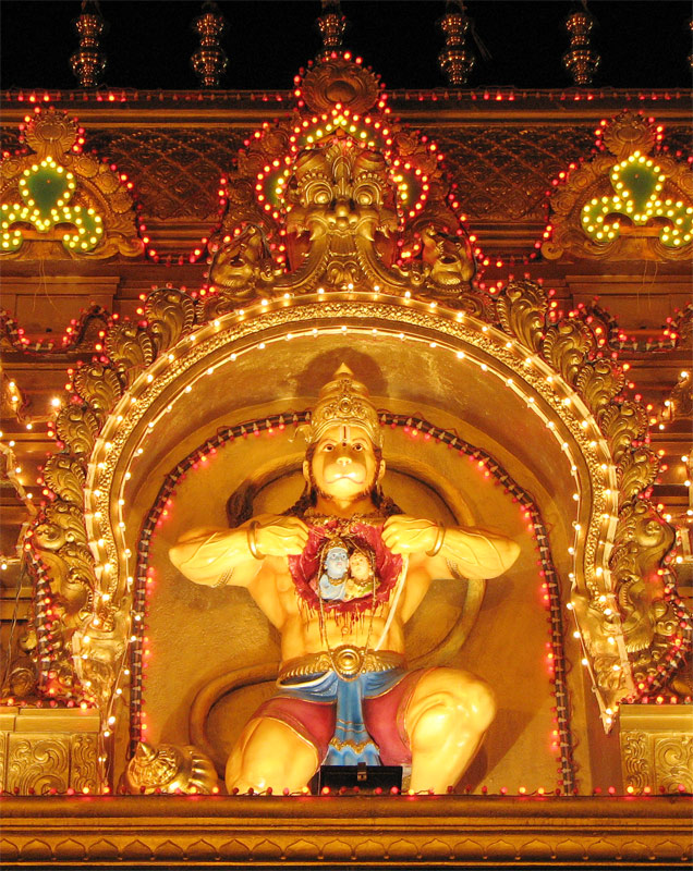 Hanuman, Mangalore navaratri